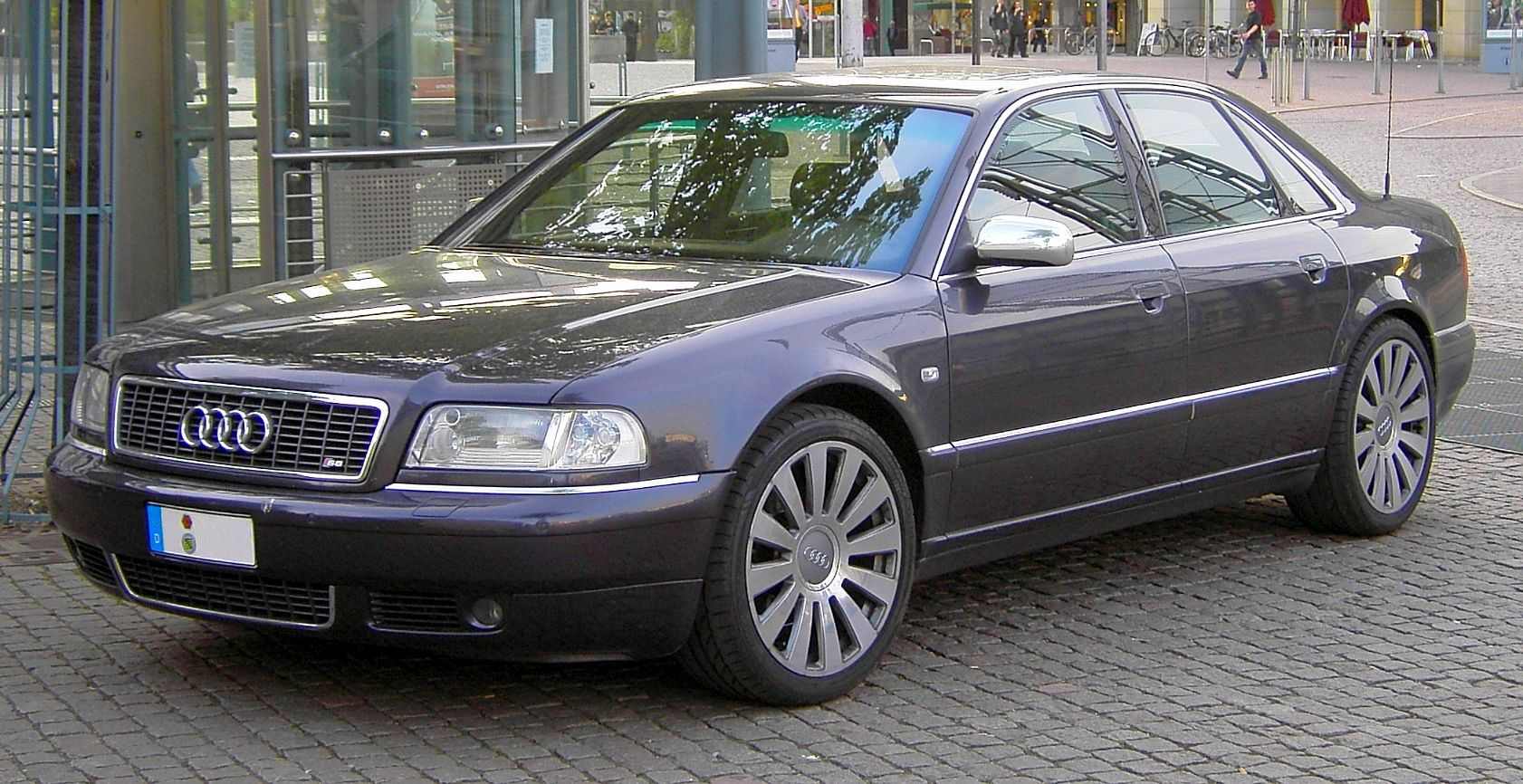 (Original text: Audi S8 (4.2l, 265 kW)) Fotograf: CrazyD, 1. Mai 2005